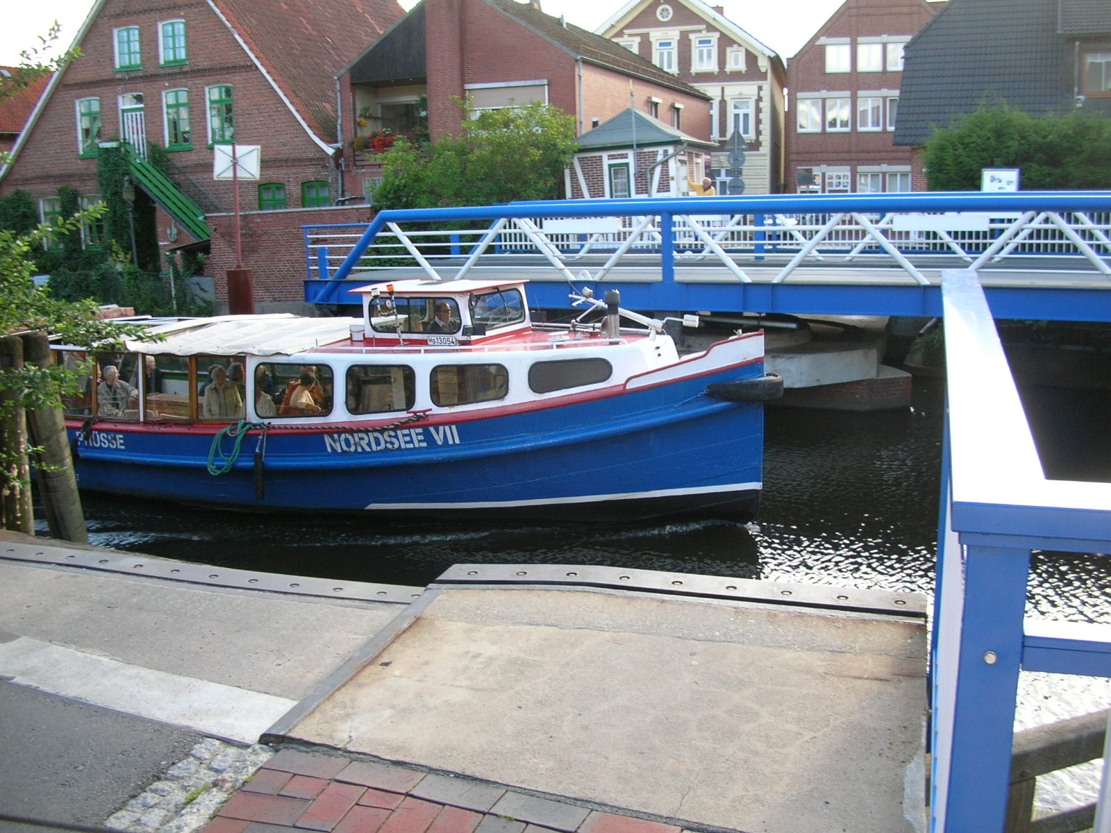 Barkasse "Nordsee VII" passiert die Drehbrücke bei Jork-Estebrügge.